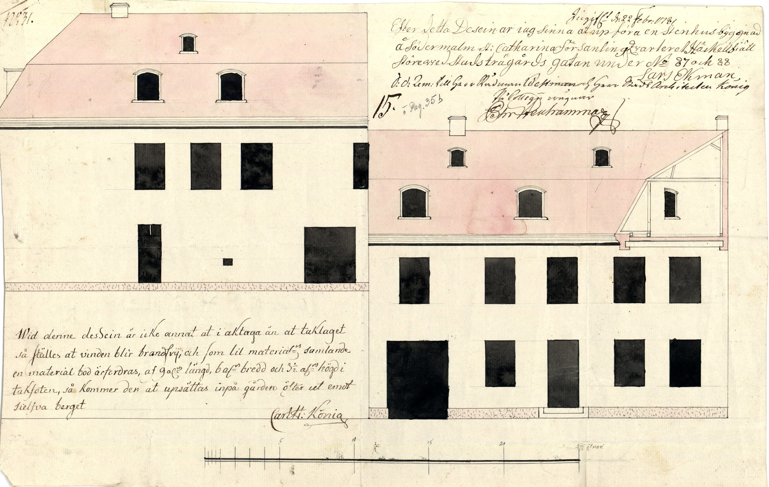 Ritningsnummer NS037-BN-1848-161 (Nytorgsgatan 5, fastigheten Terrassen 16)